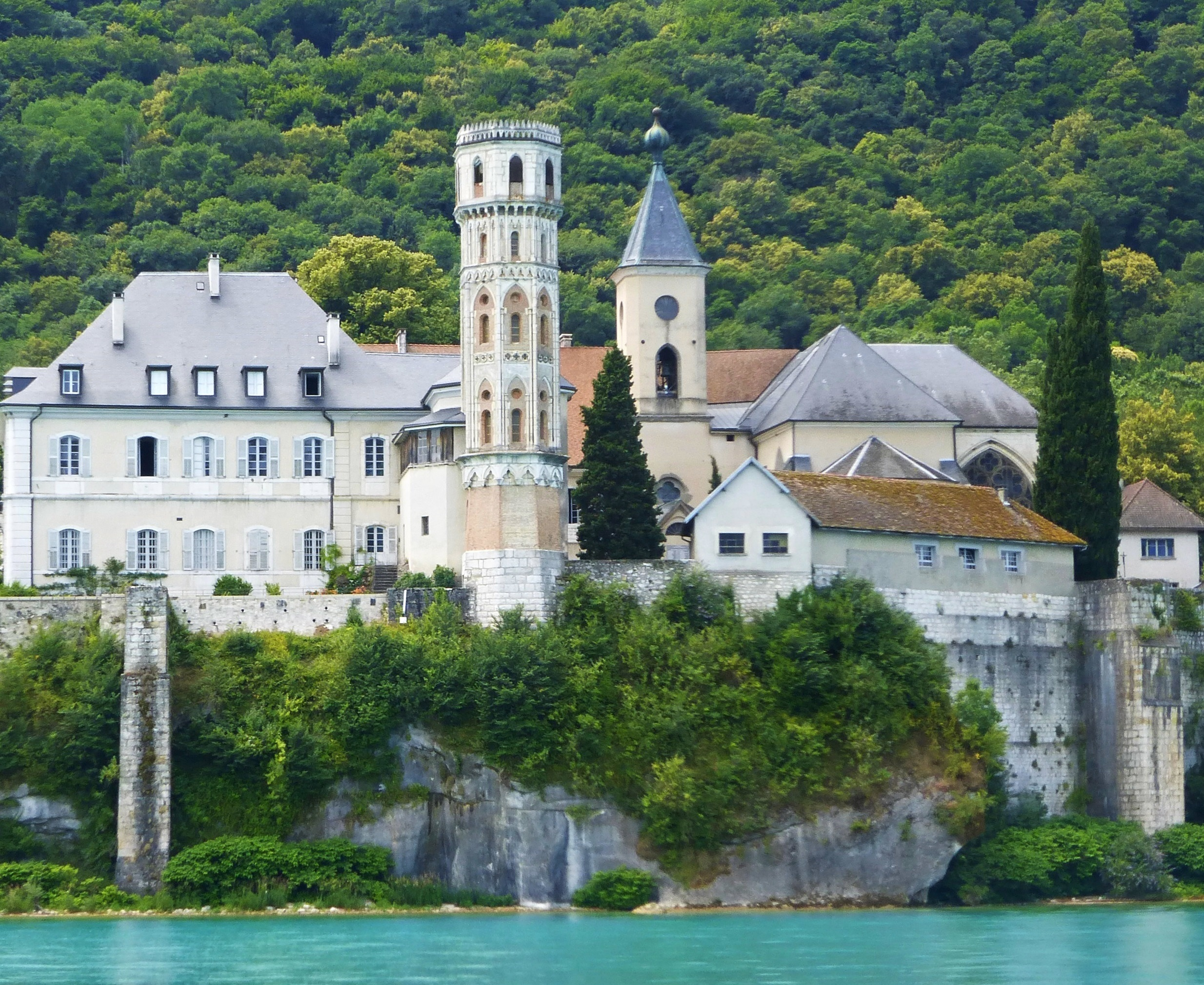 Sur les rives sauvages du lac du Bourget, l'Abbaye d'Hautecombe.